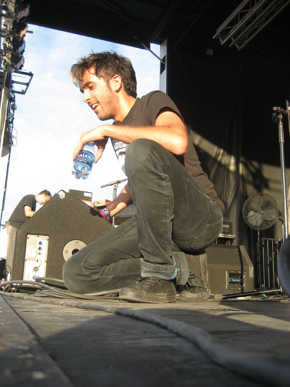 voxtrot_254